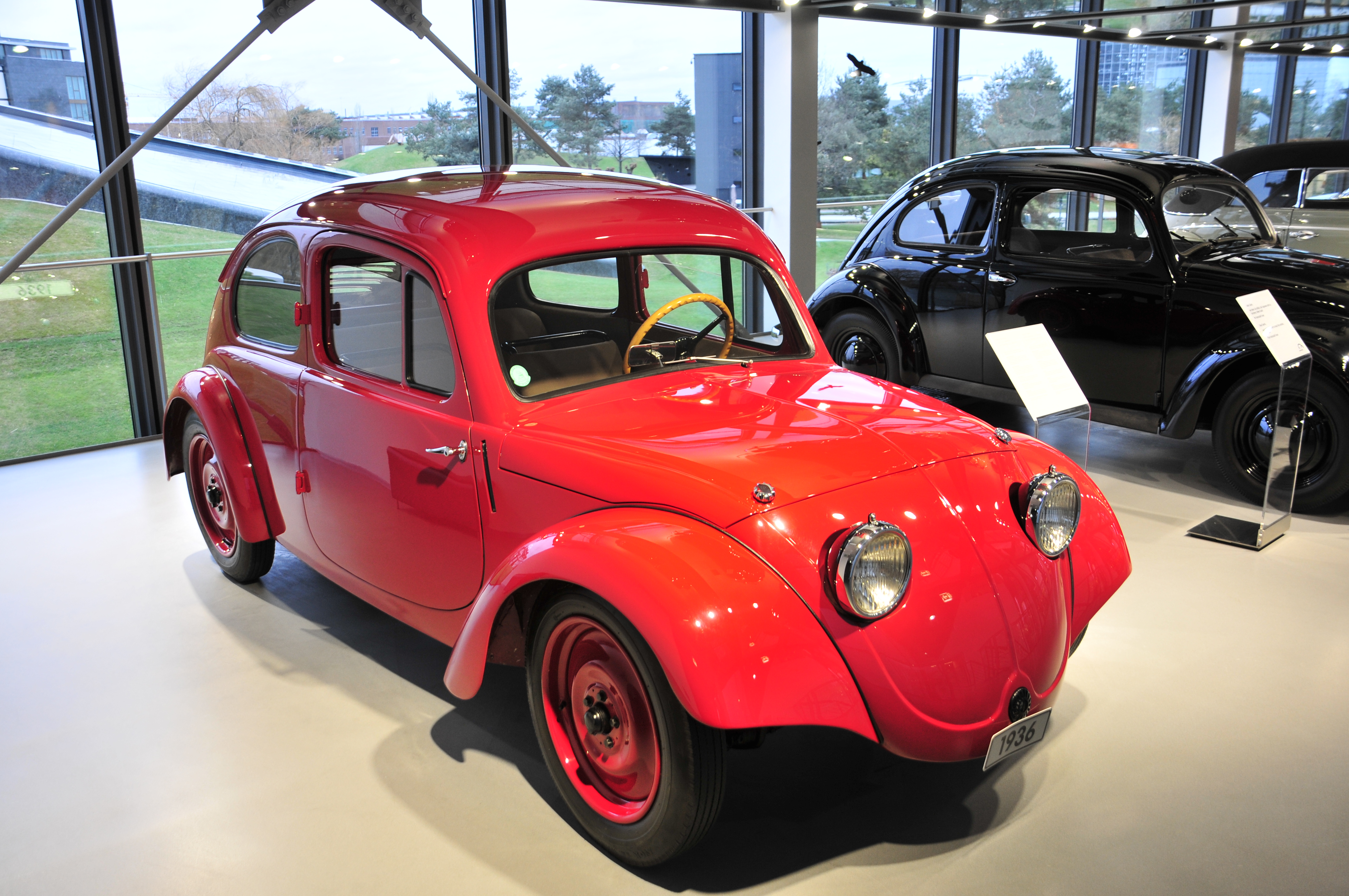 Fahrzeug in der Autostadt Wolfsburg